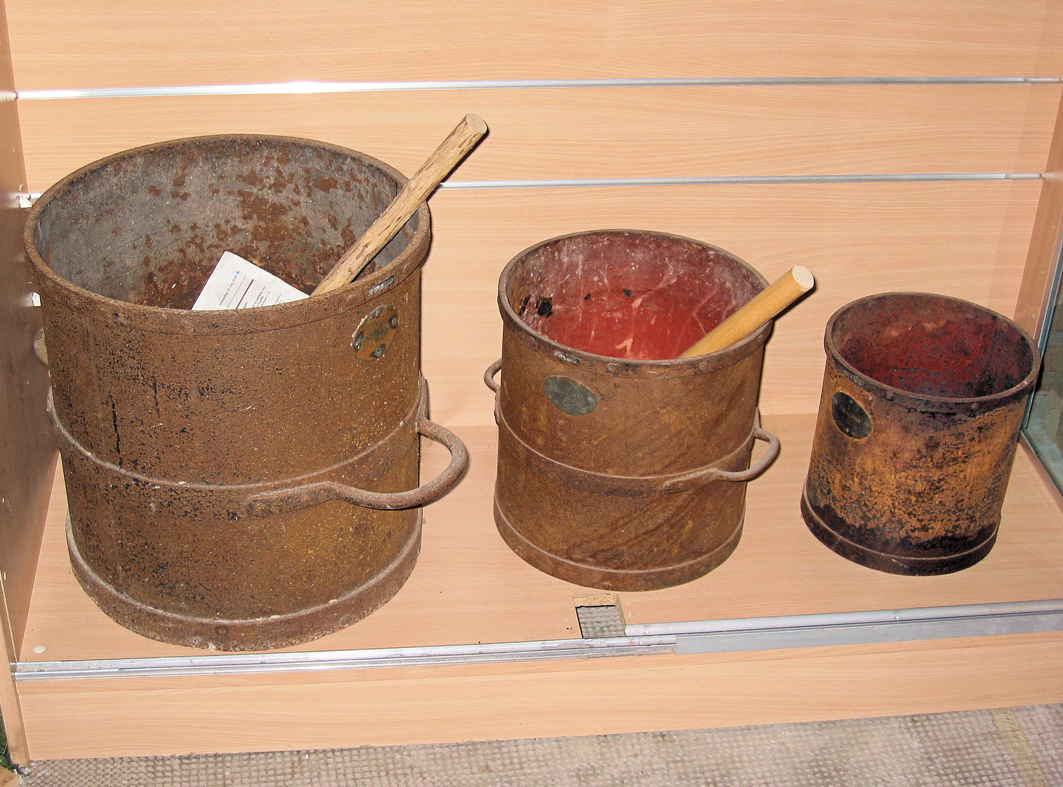 Inhoudsmaten: mud, schepel en kop (spint)